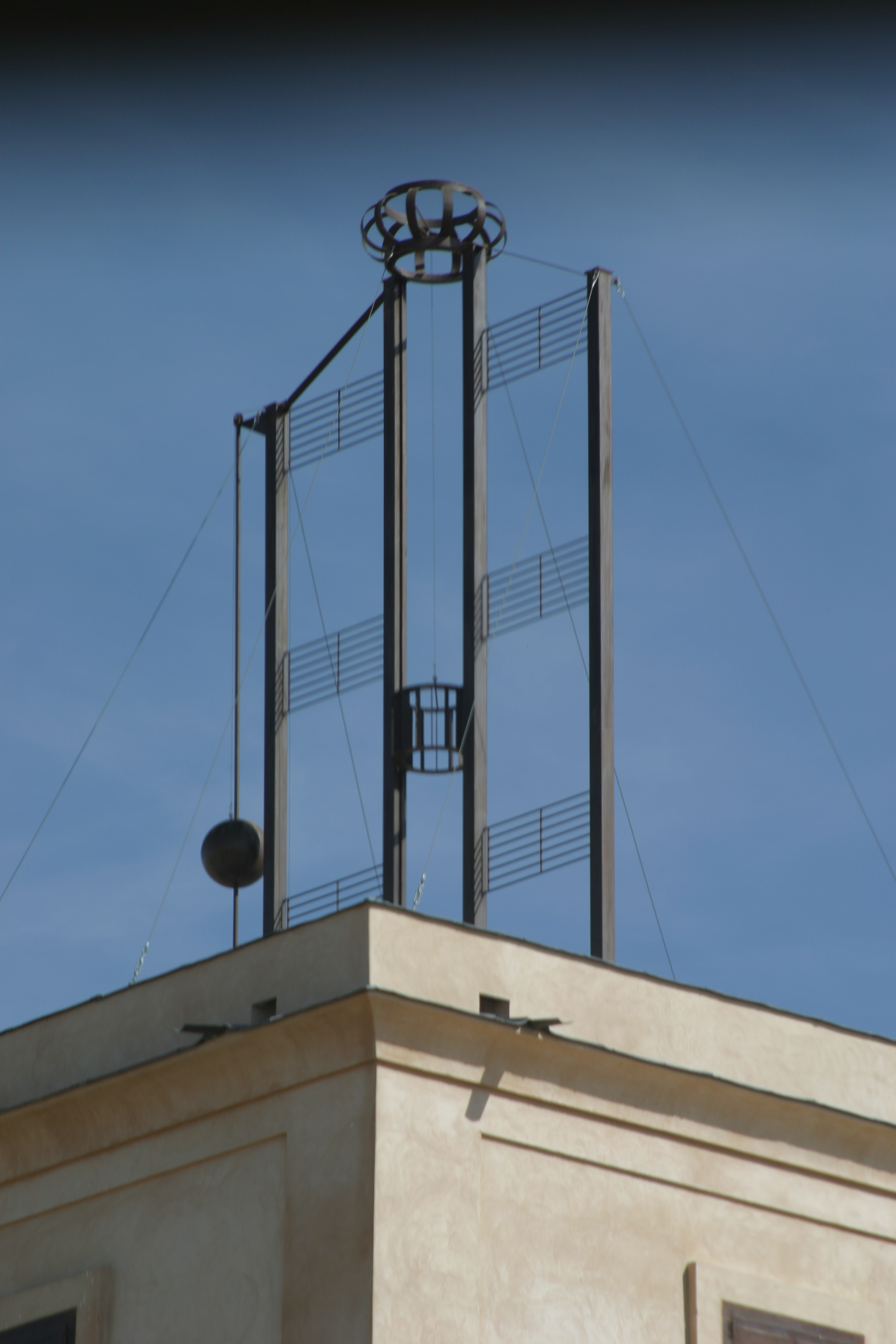 Telégrafo óptico restaurado de Arévalo (Ávila, España).